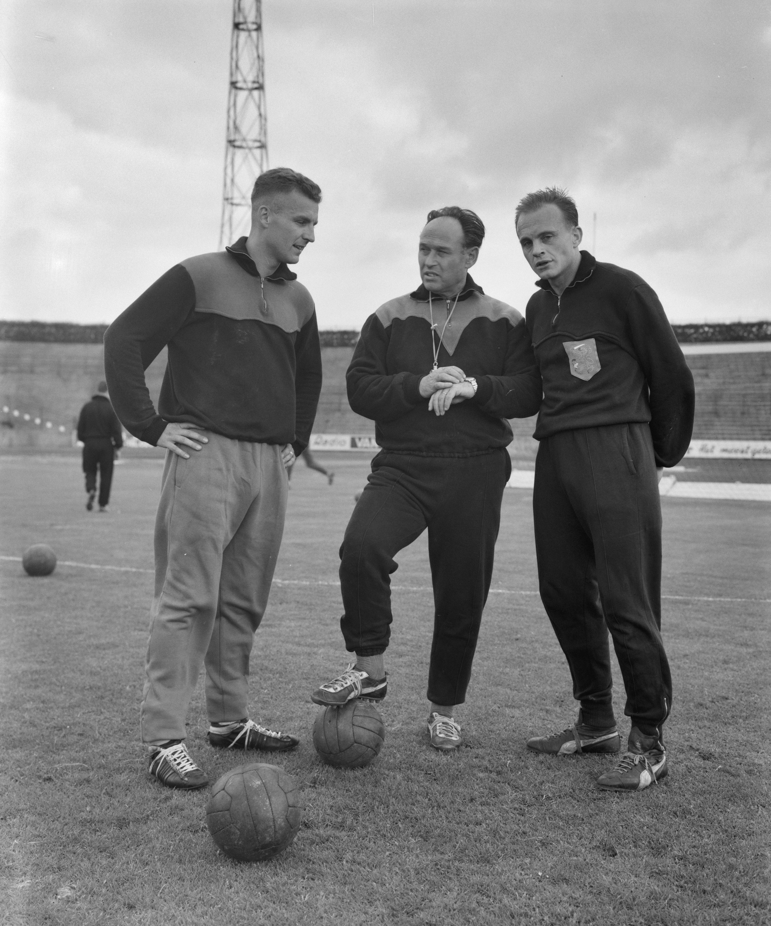 Collectie / Archief : Fotocollectie Anefo Reportage / Serie : [ onbekend ] Beschrijving : Training Nederlands elftal in Den Bosch . Elek Schwarz met Ouderland (r.) en Hans de Koning Datum : 9 mei 1961 Locatie : Den Bosch Trefwoorden : elftallen Persoonsnaam : Hans de Koning Fotograaf : Rossem, Wim van / Anefo Auteursrechthebbende : Nationaal Archief Materiaalsoort : Negatief (zwart/wit) Nummer archiefinventaris : bekijk toegang 2.24.01.04 Bestanddeelnummer : 912-4675